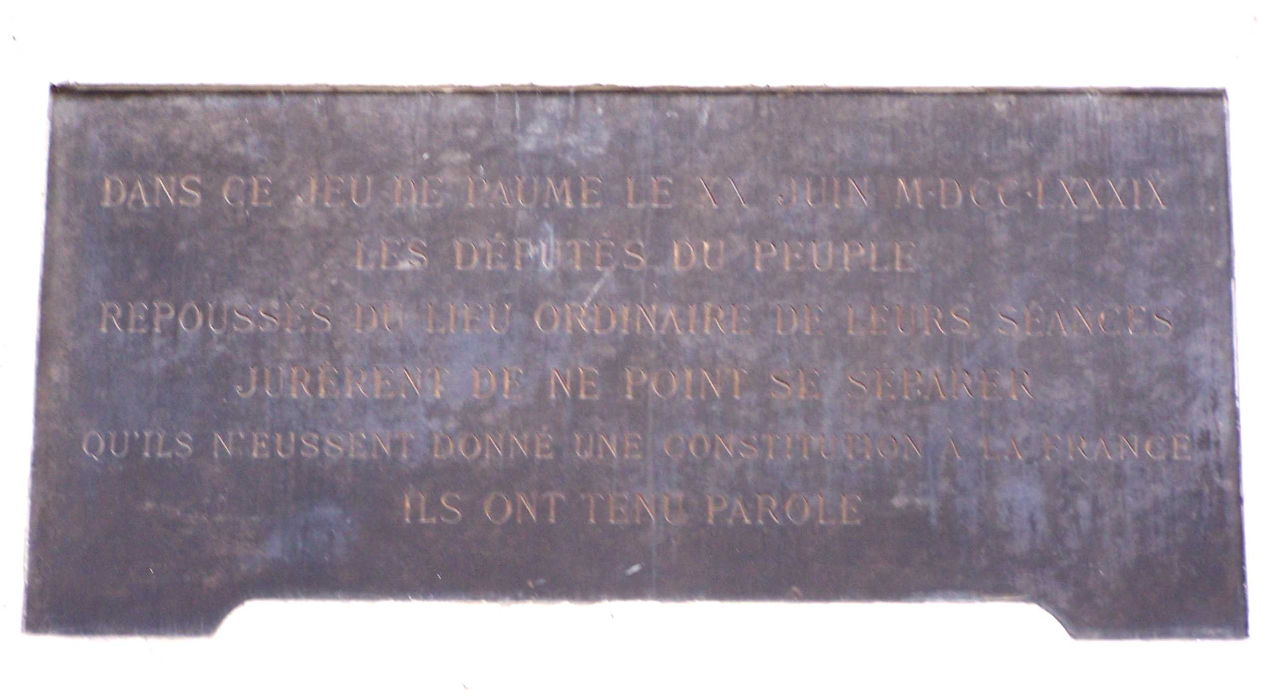 Plaque commémorative du Serment du Jeu de paume (20 juin 1789) à Versailles (Yvelines, France) Dans ce Jeu de paume, le XX juin MDCCLXXXIX, les députés du peuple, repoussés du lieu ordinaire de leurs séances, jurèrent de ne point se séparer qu'ils n'eussent donné une constitution à la France. Ils ont tenu parole.